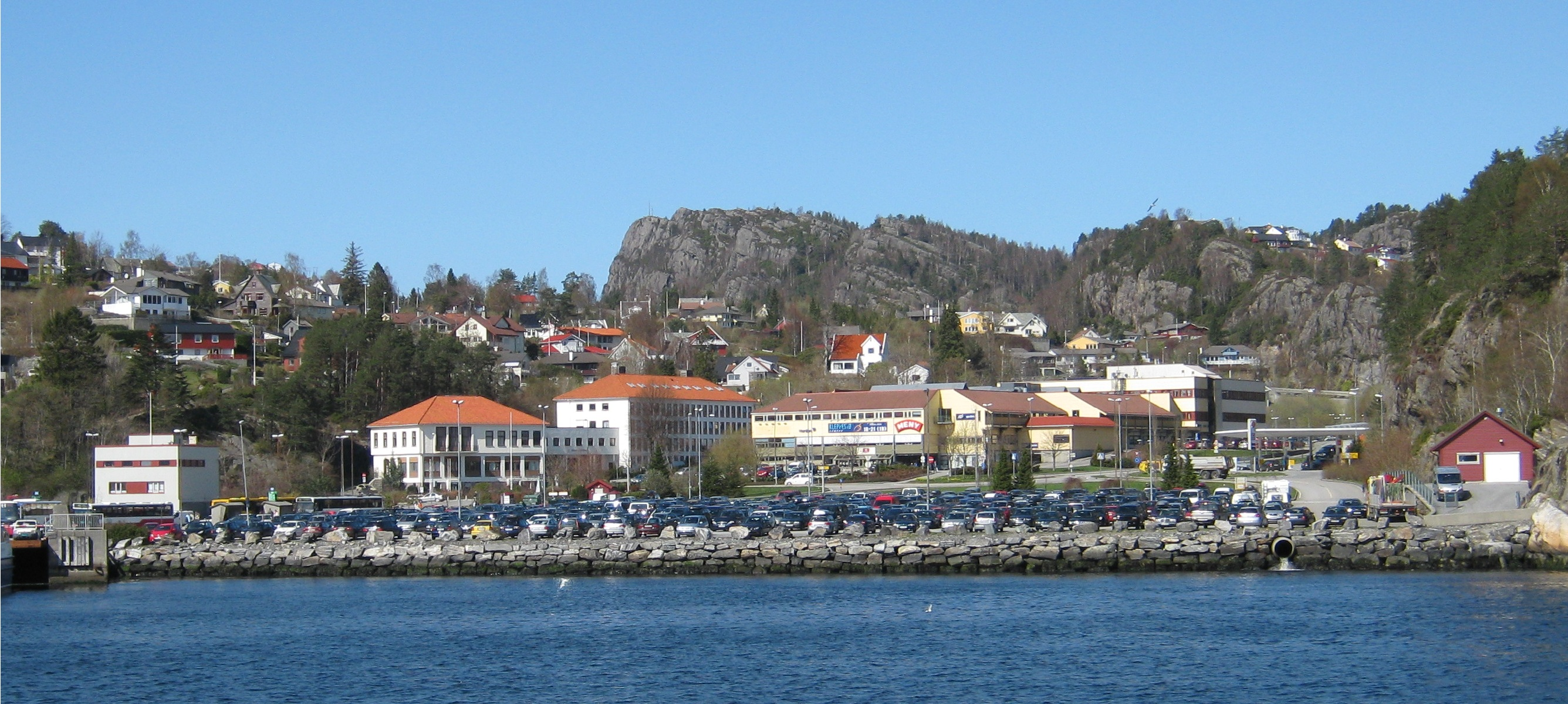 Kleppestø sentrum med Kleppestø kai, Kleppestø senter og Askøy Rådhus